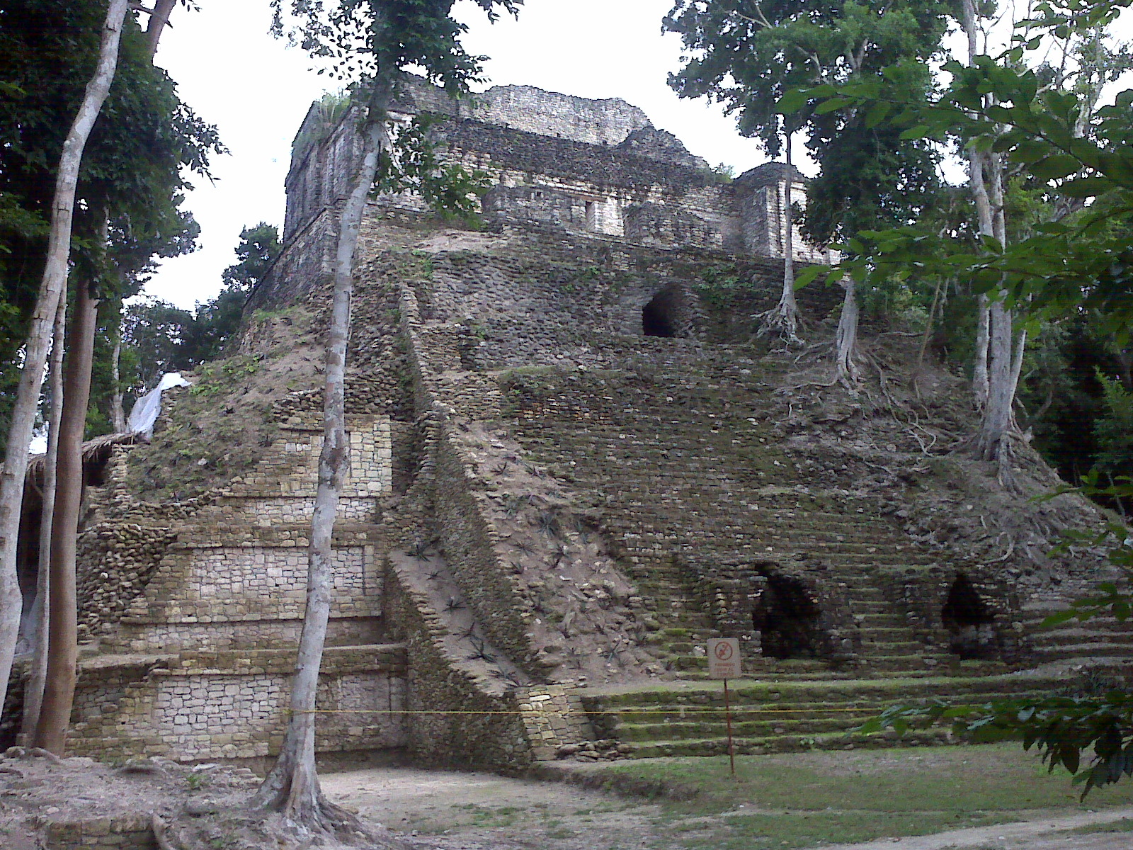 Pirámide principal que presente en la parte baja de sus techos, tableros de madera dura bellamente labrados a mano con inscripciones jeroglíficas mayas únicas en su género. Pertenece a la ruta de sitios arqueológicos poco conocidos del estado mexicano de Quintana Roo, en el caribe.